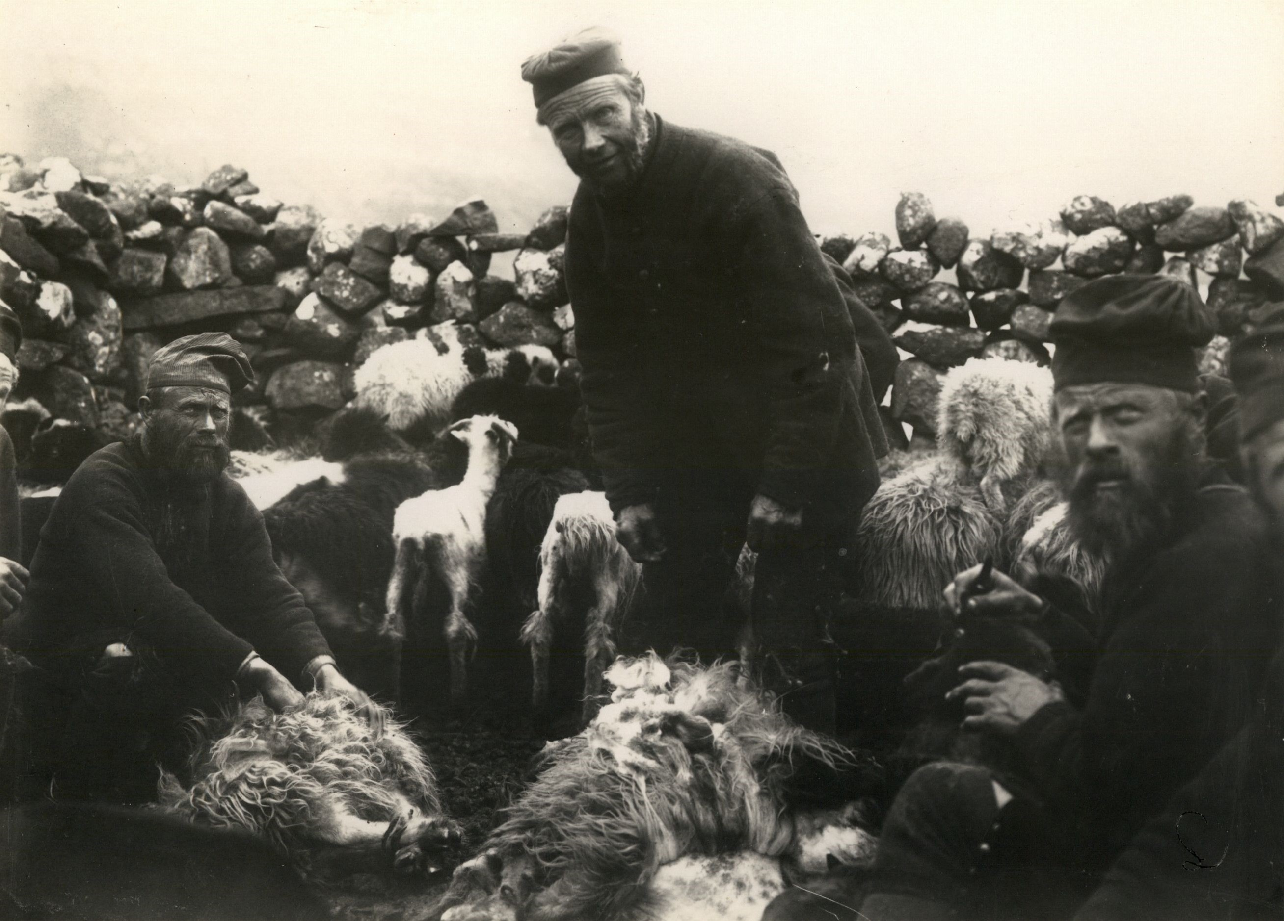 Sandur, á Kálvmannarætt, Faroe Islands